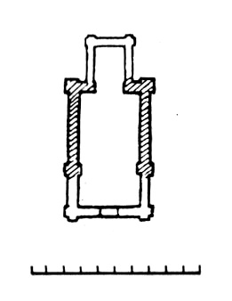 Пятніцкая царква Бельчыцкага манастыра